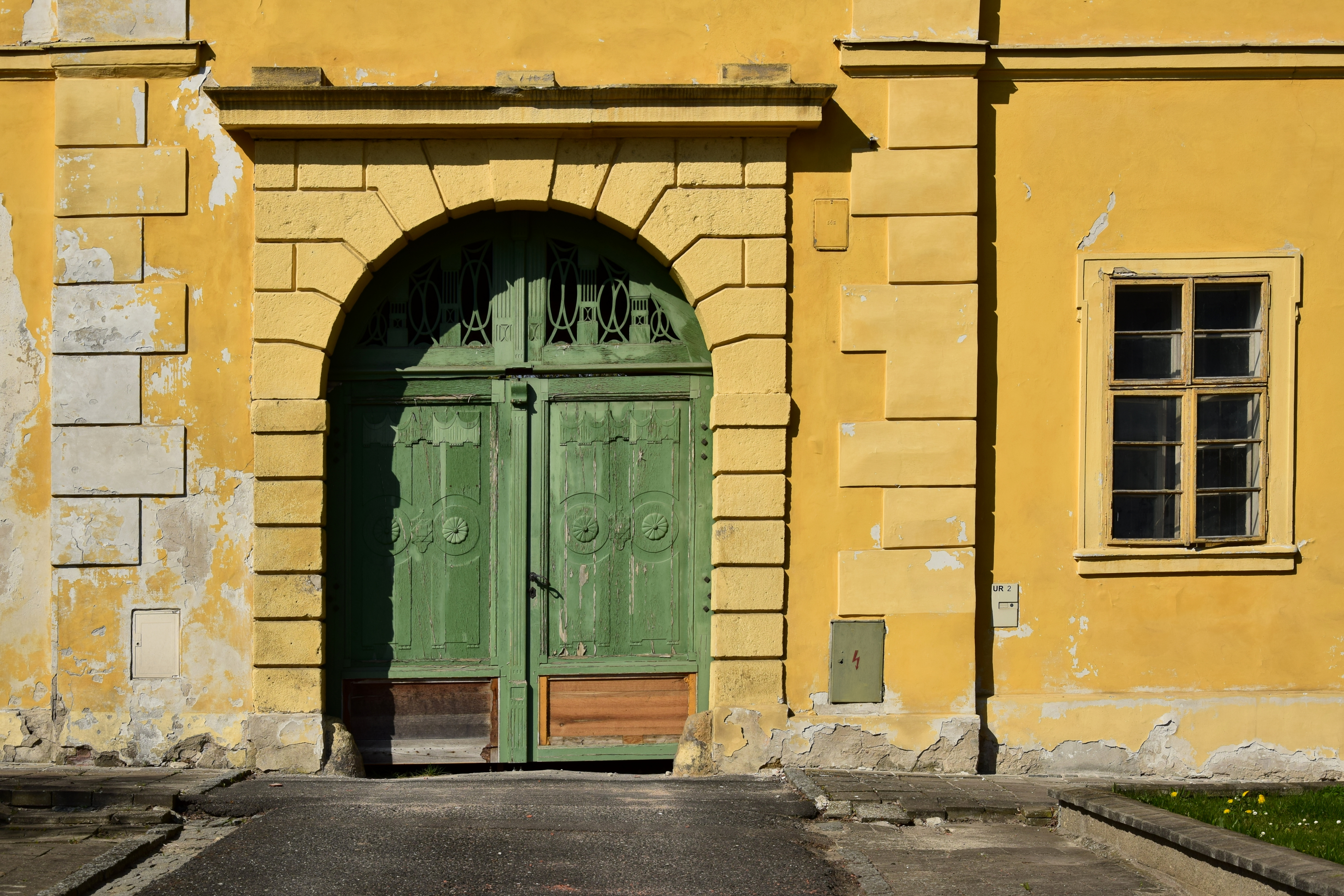 Zámek Cítoliby – vstupní portál